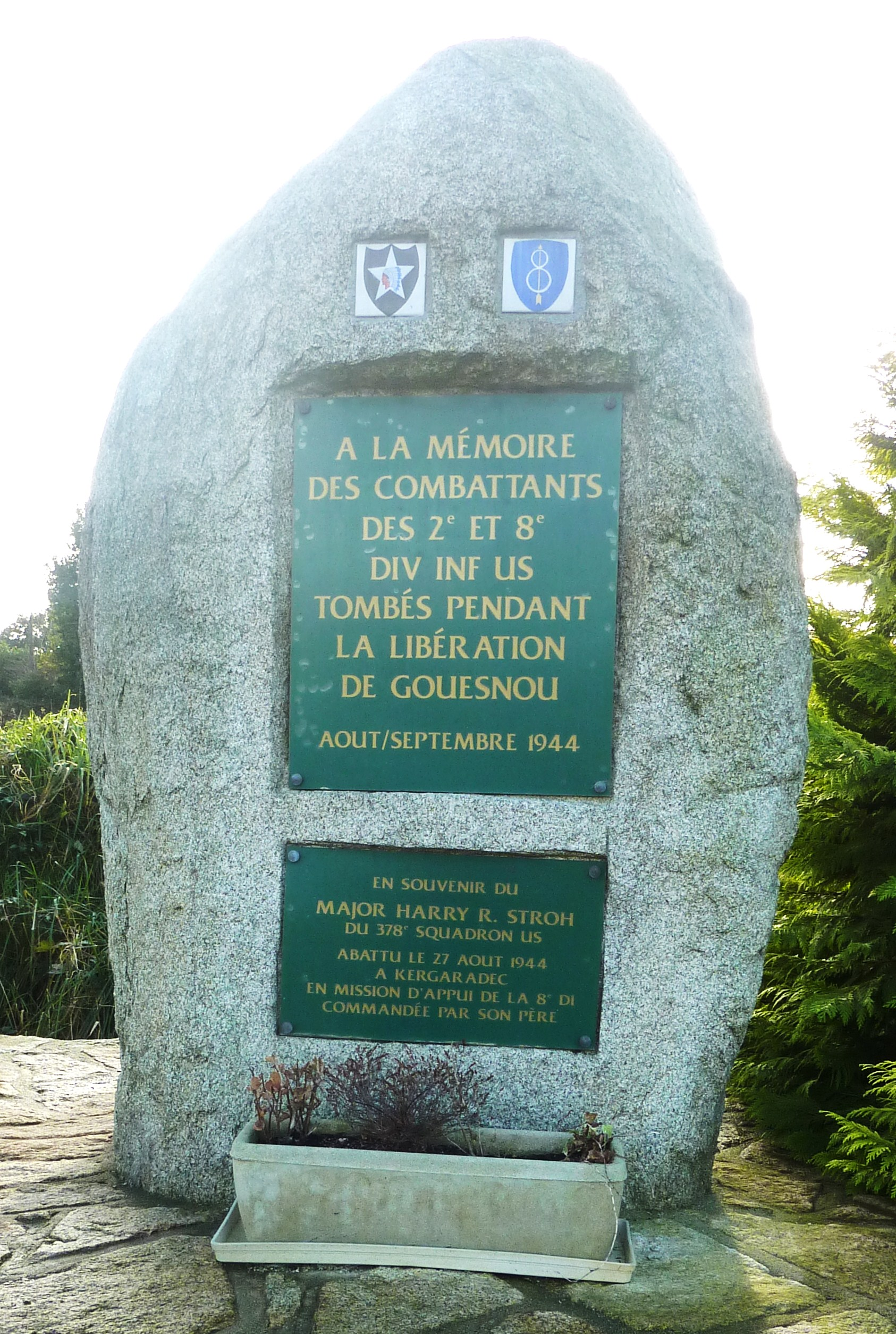 Gouesnou : monument commémorant la libération de Gouesnou (2ème et 8e divisons américaines)